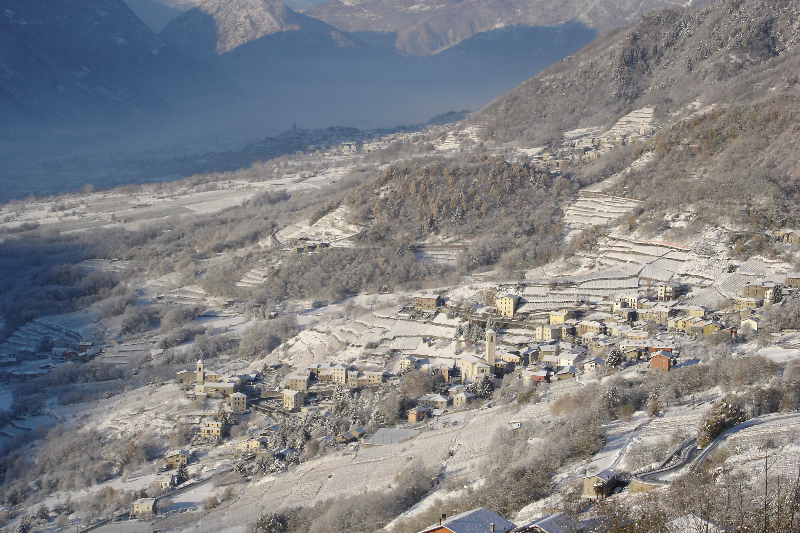 immagine del centro storico di castione andevenno sotto la neve il 27 novembre 2005